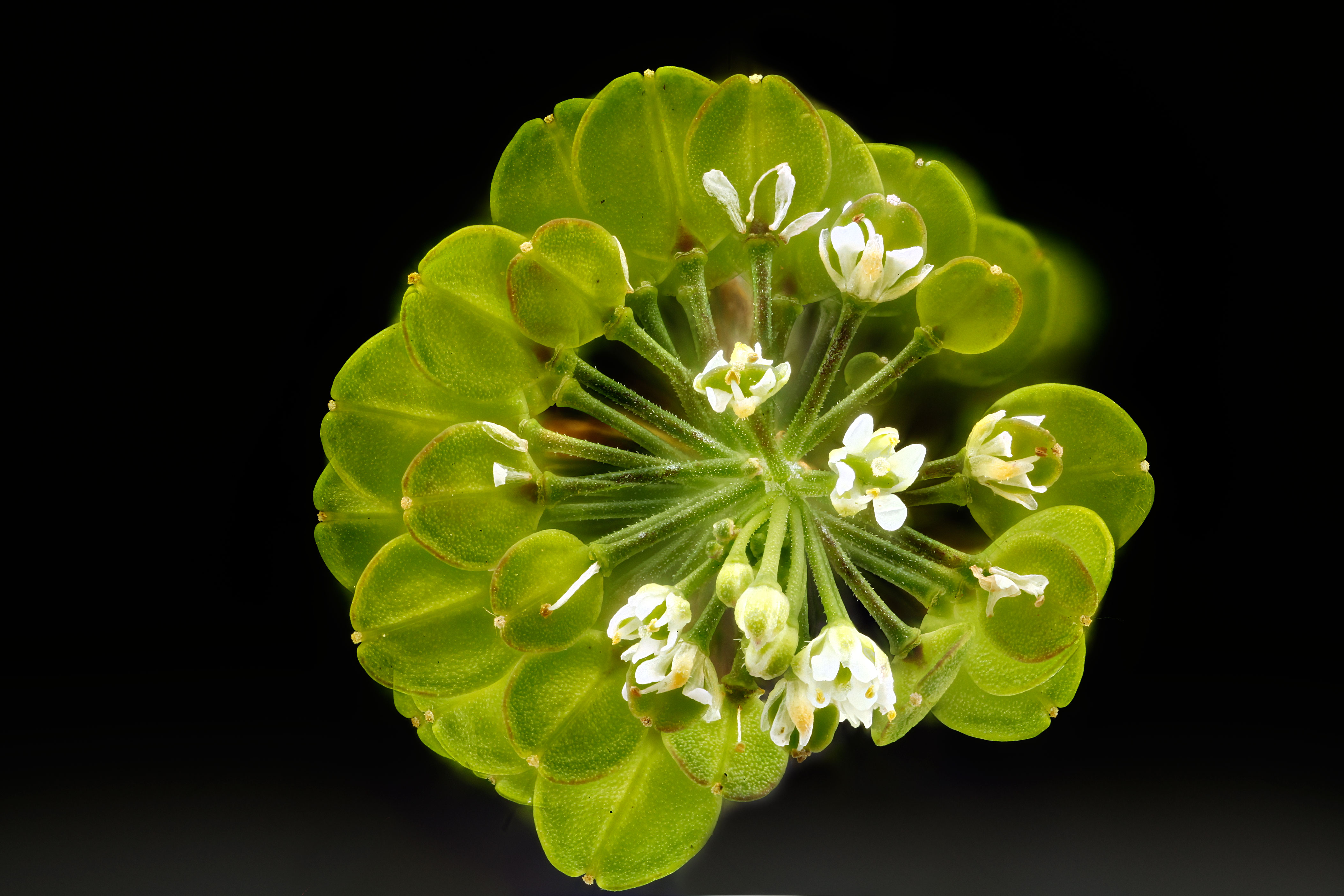 Lepidium virginicum, Beltsville, MD, May 2012